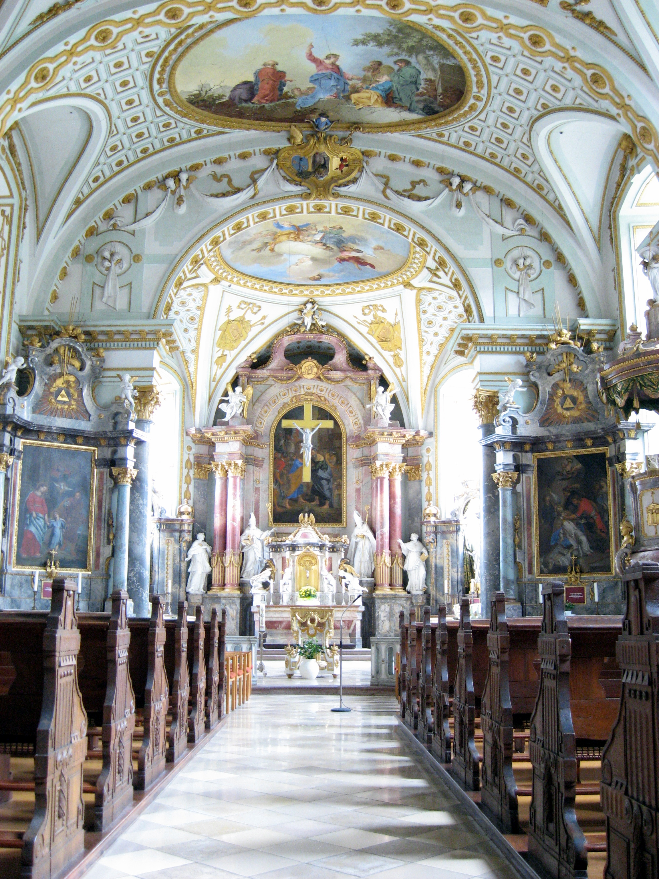 Kloster Triefenstein, Klosterkirche